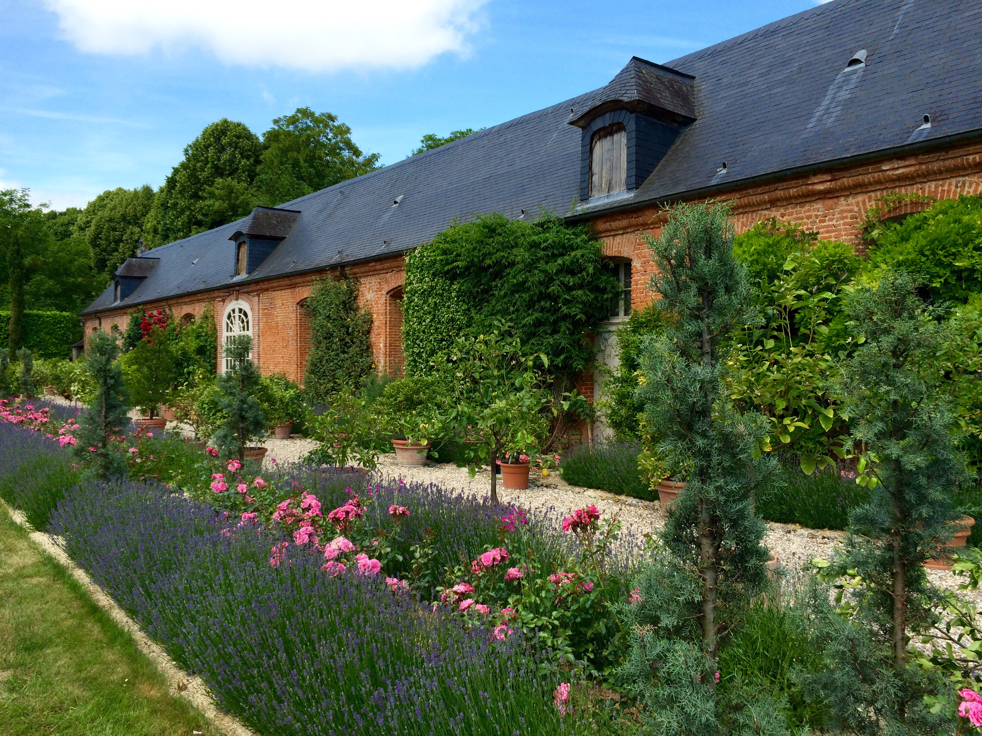 Orangerie 18ème en brique rose avec sa collection d'agrumes